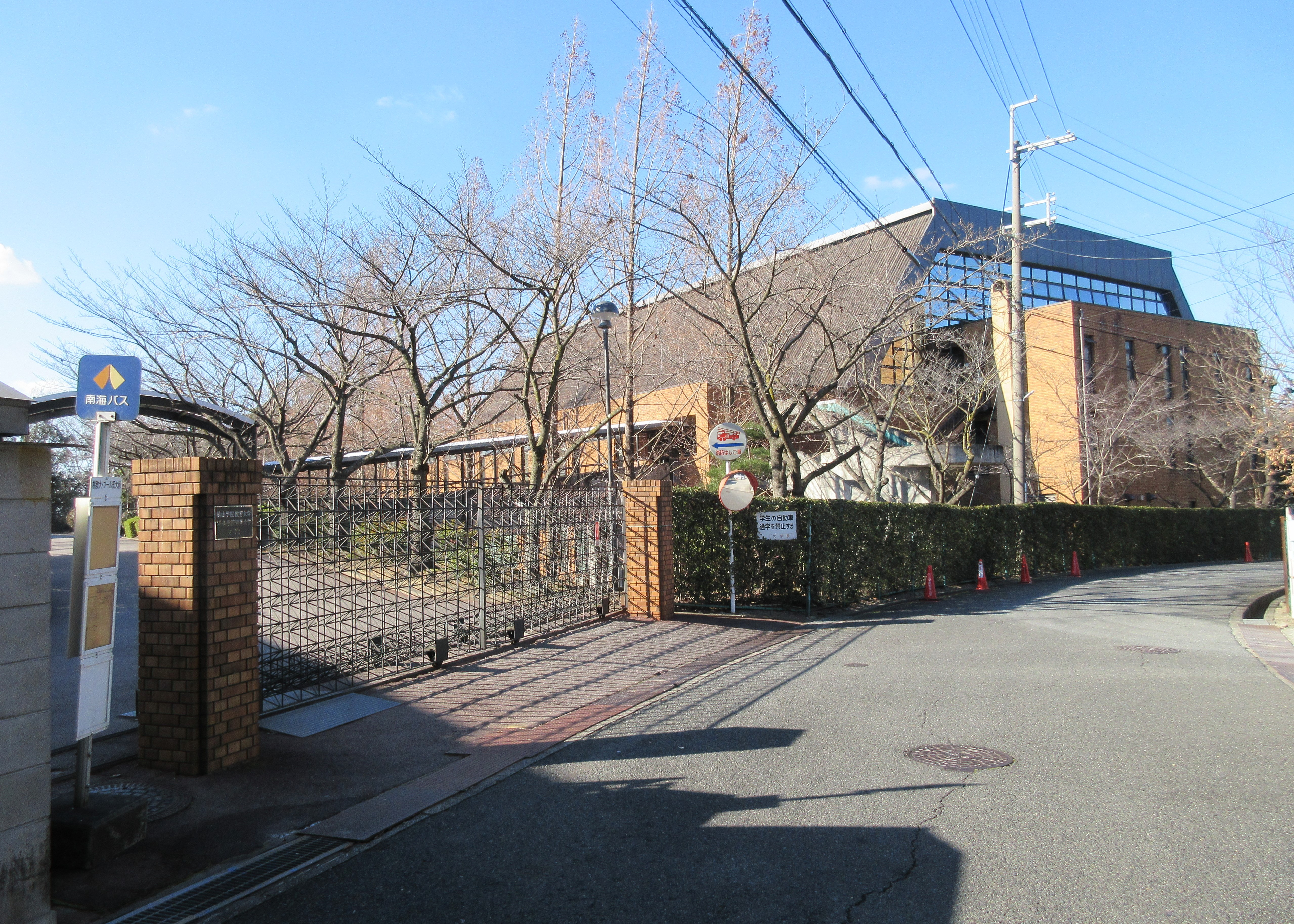 プール学院短期大学